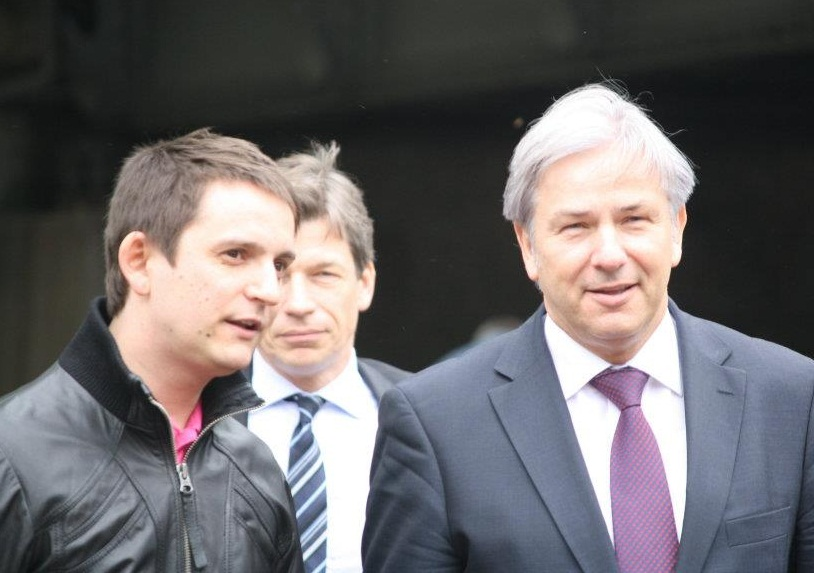 LSVD-Geschäftsführer Jörg Steinert mit Berlins Regierendem Bürgermeister Klaus Wowereit bei der Eröffnung der Pride Weeks